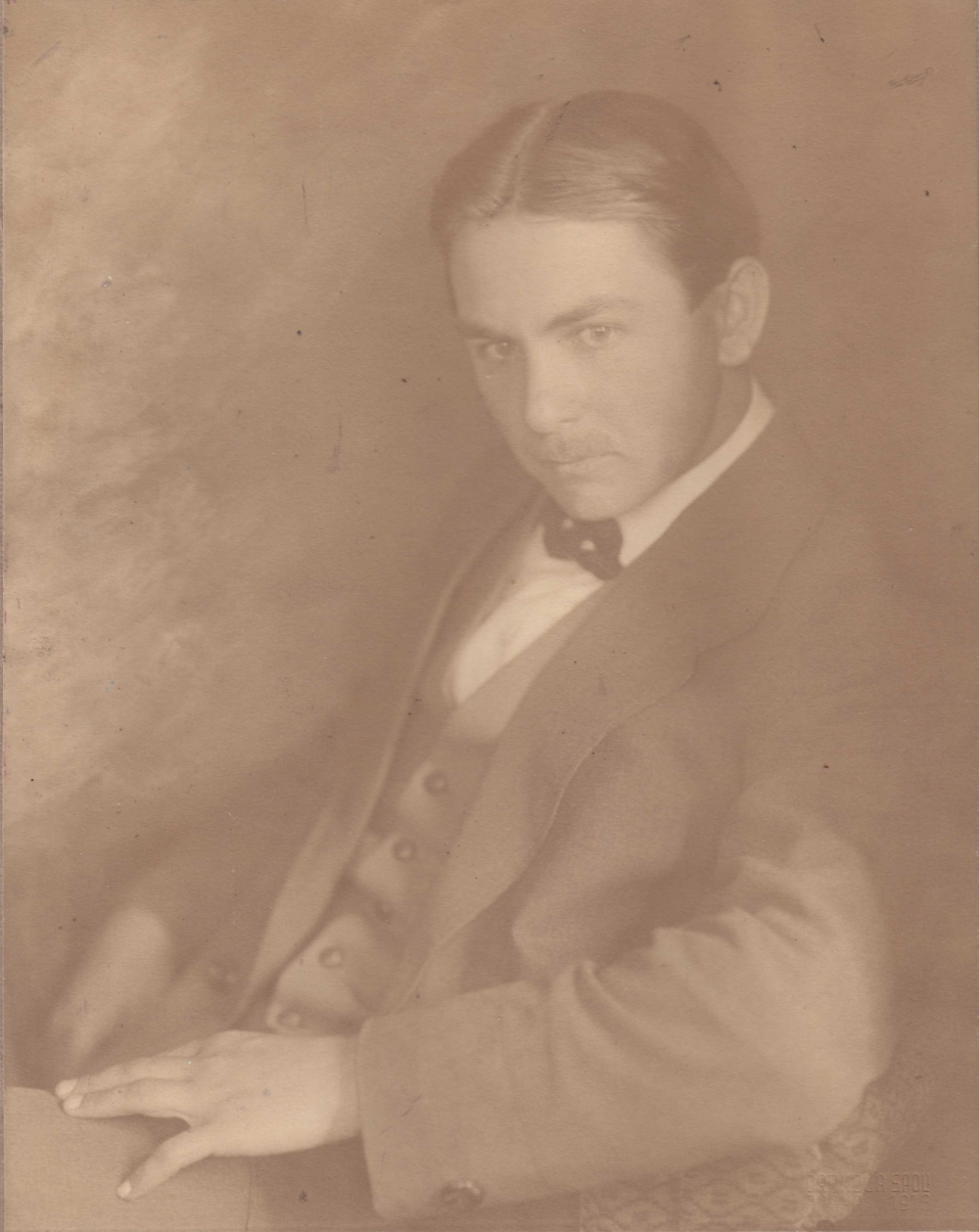 Josef Hodek ml (1888-1973), český pedagog, ilustrátor, grafik a malíř